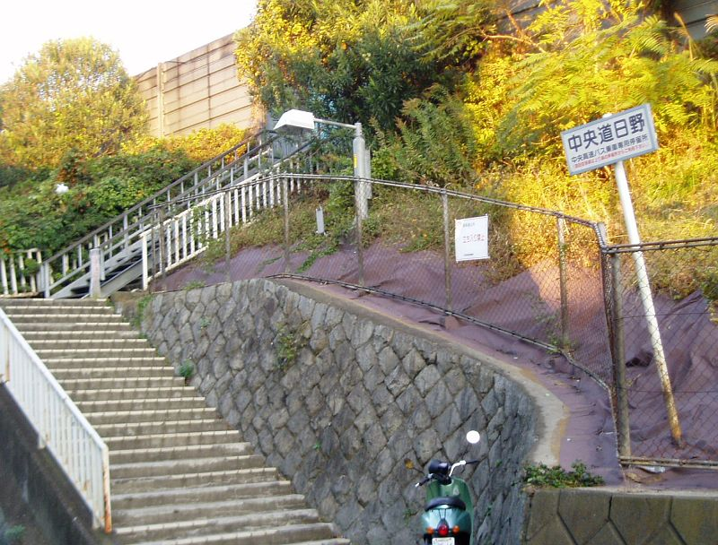 日野バスストップ入り口